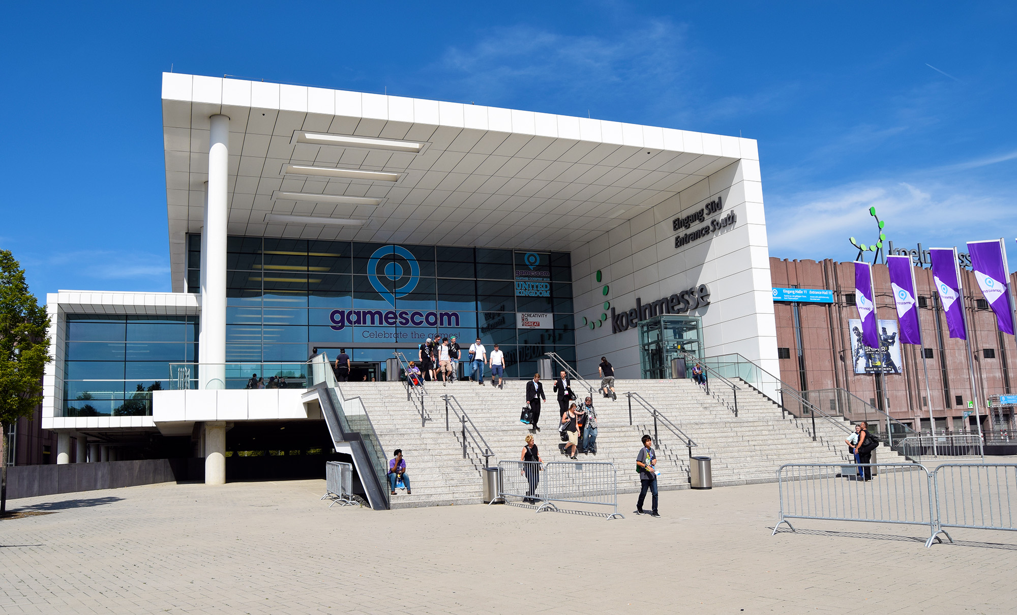 Südeingang der gamescom im Jahr 2015